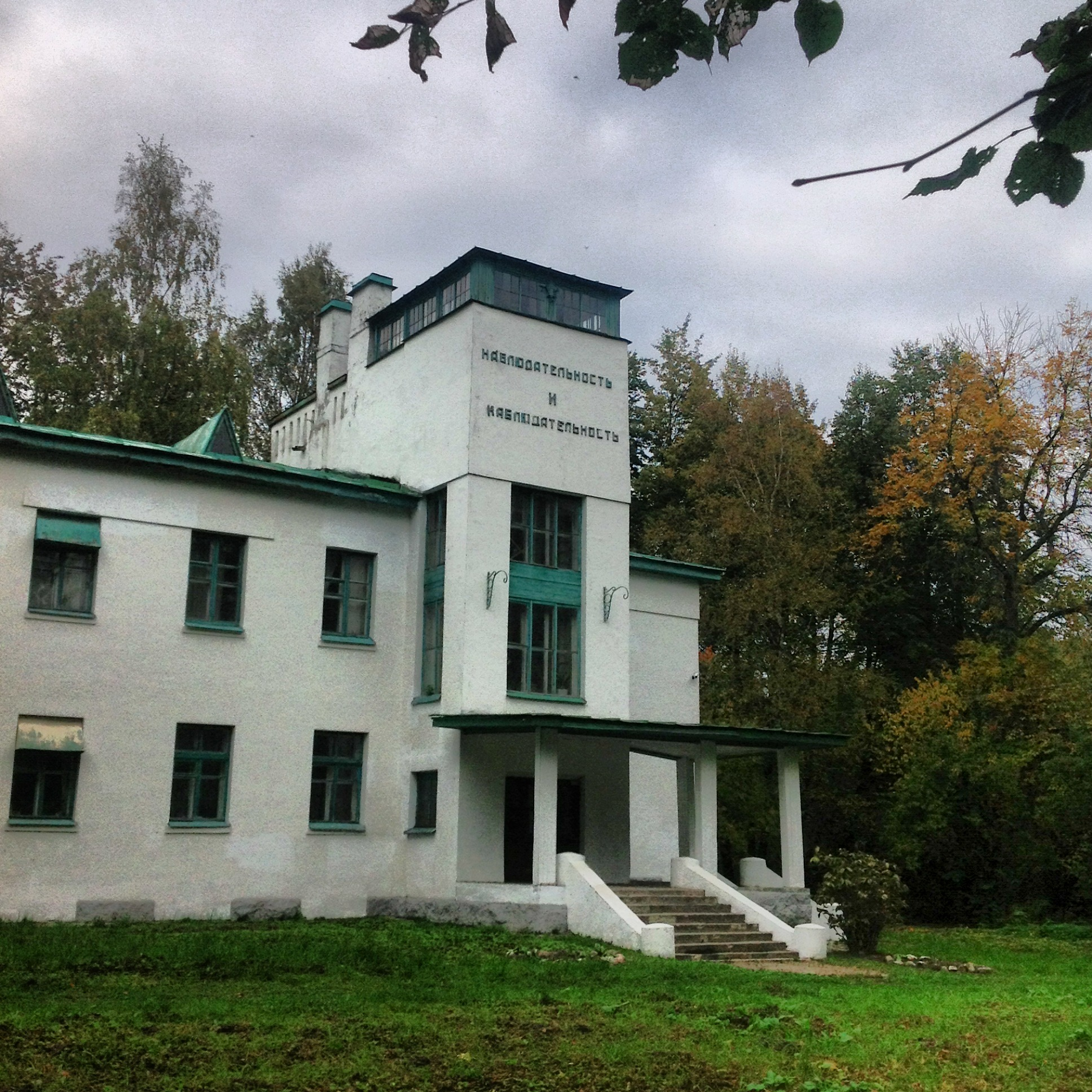 Лаборатория Ивана Павлова